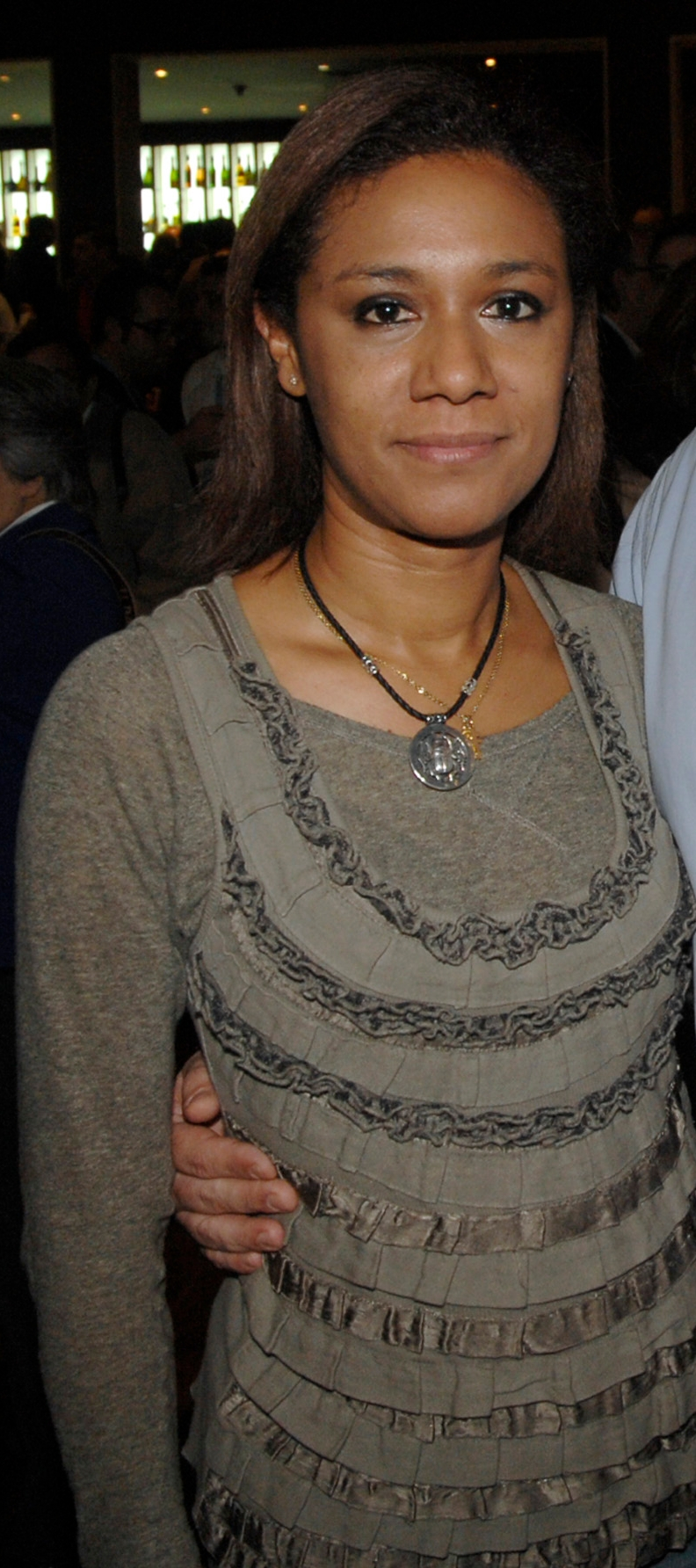 Portaveu del Consell i Periodista a RTVV, Lola Johnson Sastre.